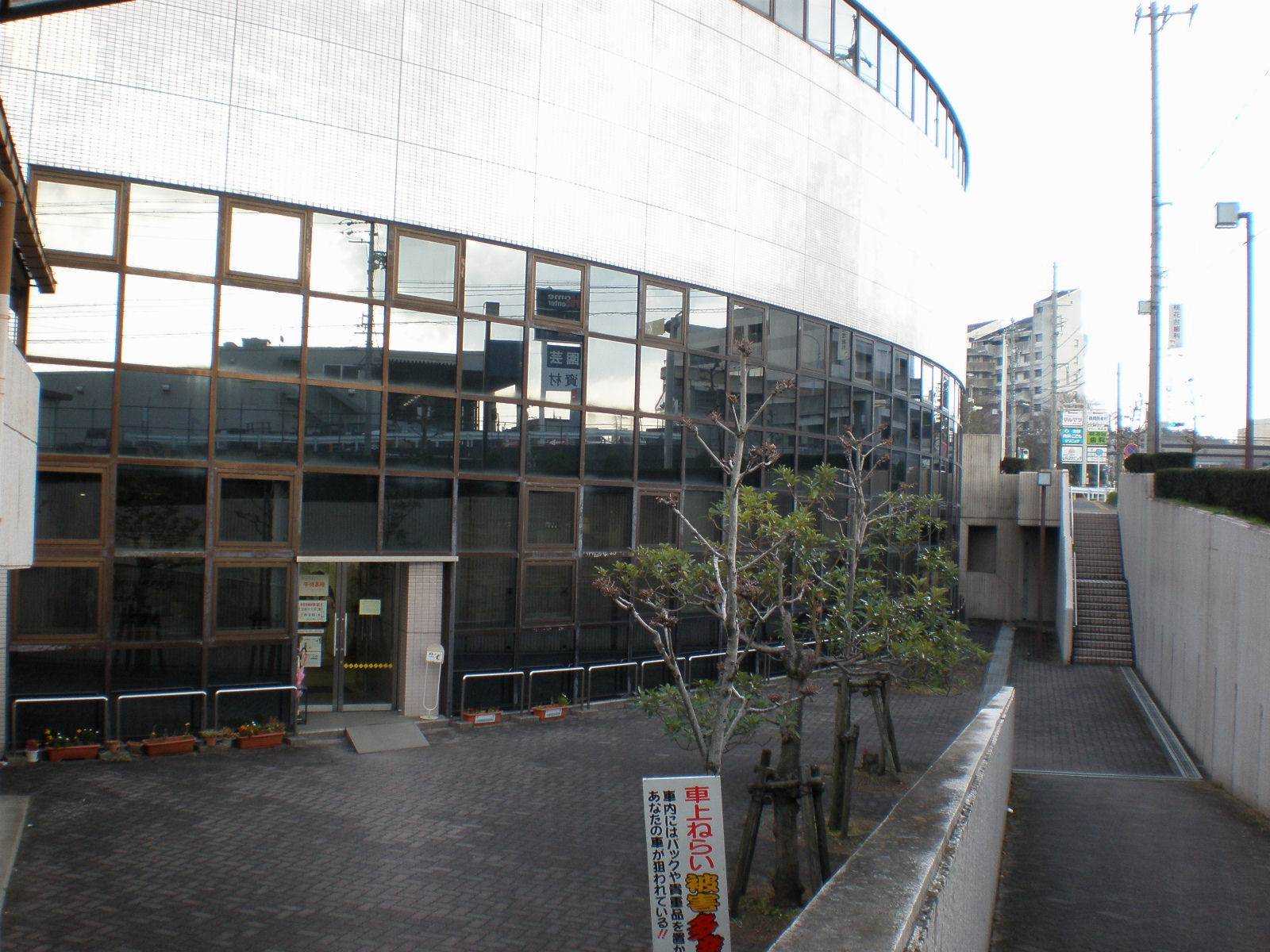 愛知県小牧市の東部市民センター地下にある東部市民センター図書室